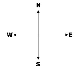 Схема определения направления интерфейса по направлению передачи данных от системы в центре схемы. Названия направлений соответствуют названию сторон света на компасе.